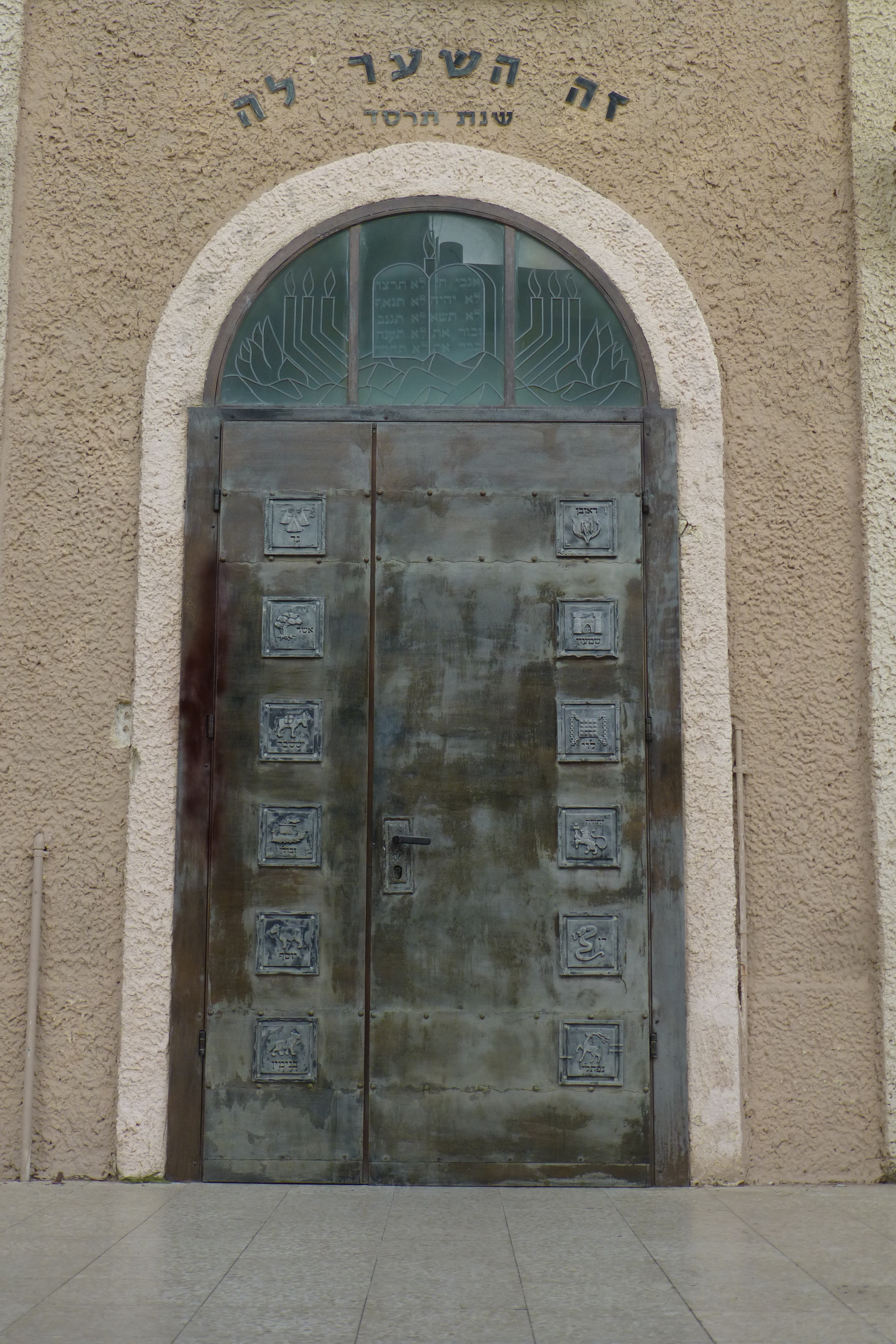 בית הכנסת הגדול "אוהל שרה" - בית הכנסת הראשון של רחובות, נבנה בשנת תרס"ד? ובהמשך שופץ והורחב והיה למוקד הקהילתי והחברתי של המושבה הצעירה.